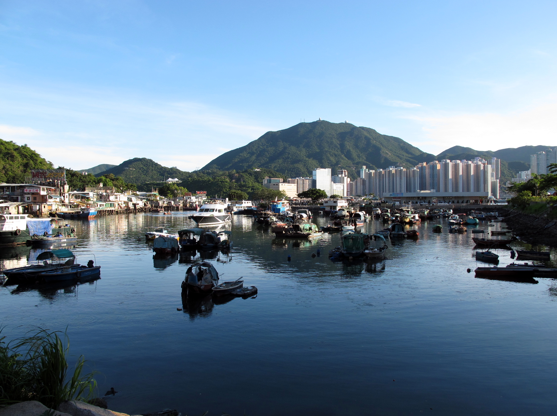 Sam Ka Tsuen Typhoon Shelter 三家村避風塘